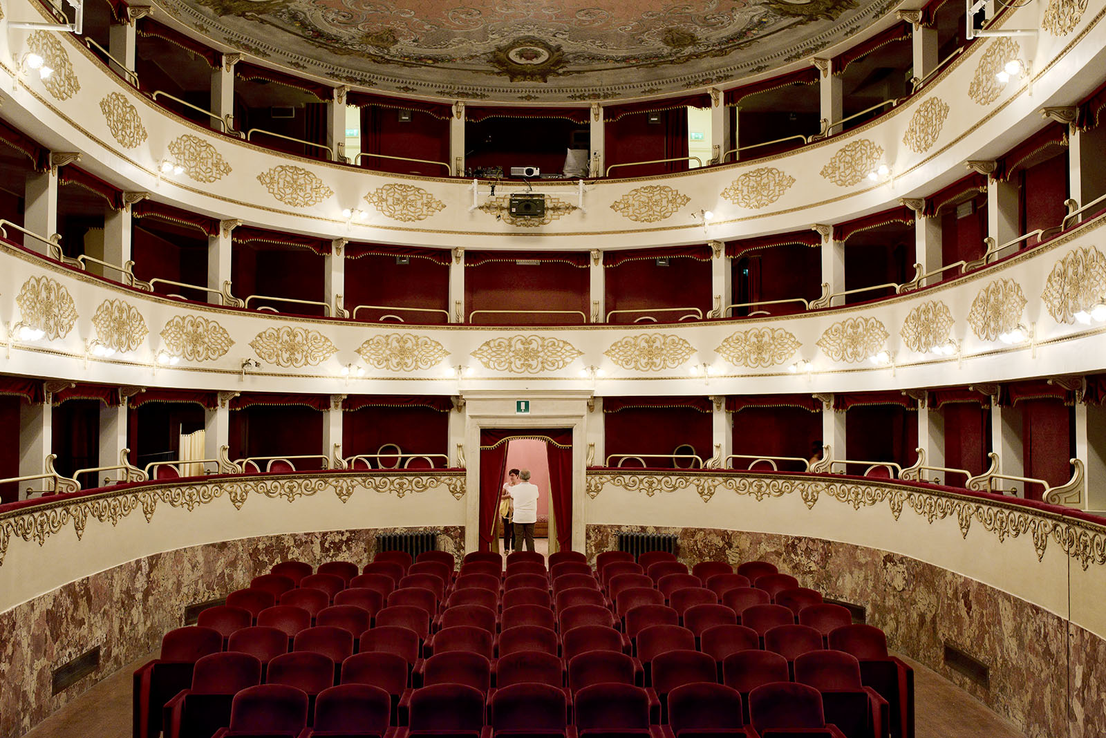 Teatro comunale Alice Zeppilli - Museo della Musica This is a photo of a monument which is part of cultural heritage of Italy.